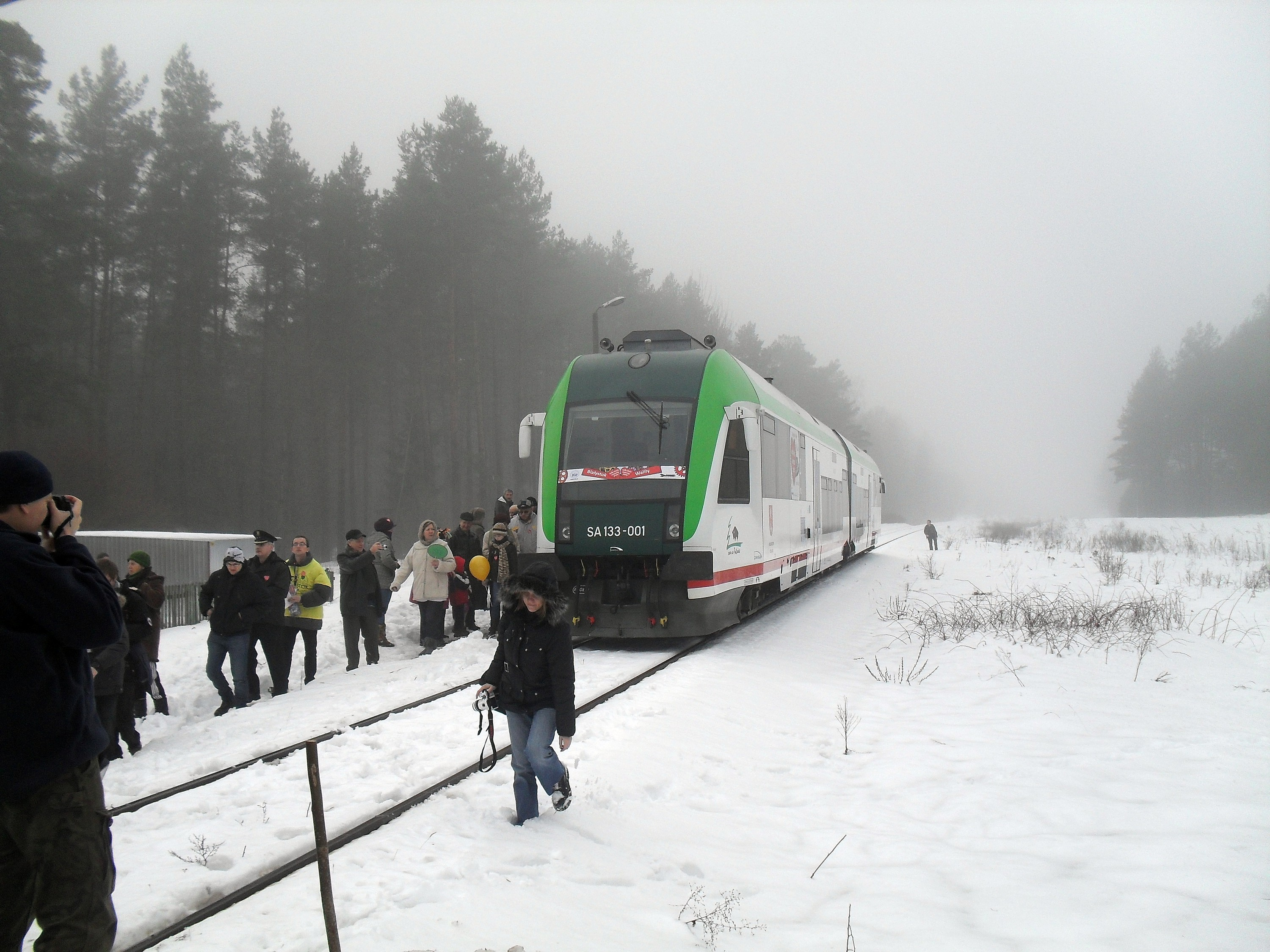 Powitanie pociągu Wielkiej Orkiestry Świątecznej Pomocy w Sokolem.